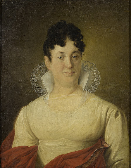 Марья Алексеевна Толстая (1771-1826), ур. Голицына